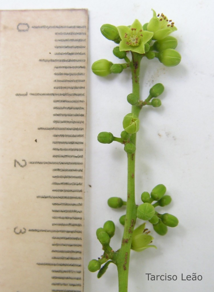 Local: Cond. Flor da Mata, Camaragibe, região de Aldeia, Pernambuco, Brasil